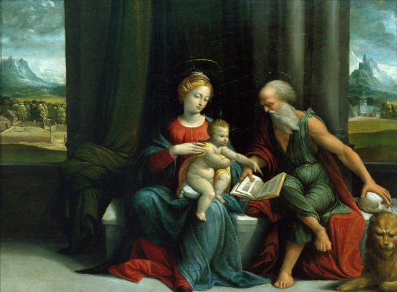 Madonna and Child and St Jeromelabel QS:Len,"Madonna and Child and St Jerome"label QS:Lfr,"Vierge à l'Enfant et saint Jérôme"